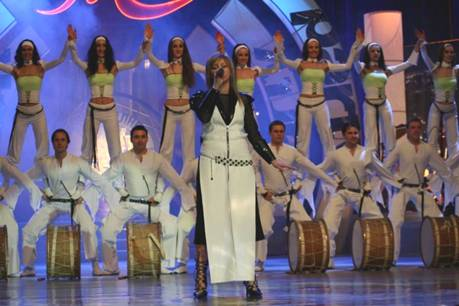 Финал на Музикална Академия Ку-Ку Бенд.Лора Владова - Сън